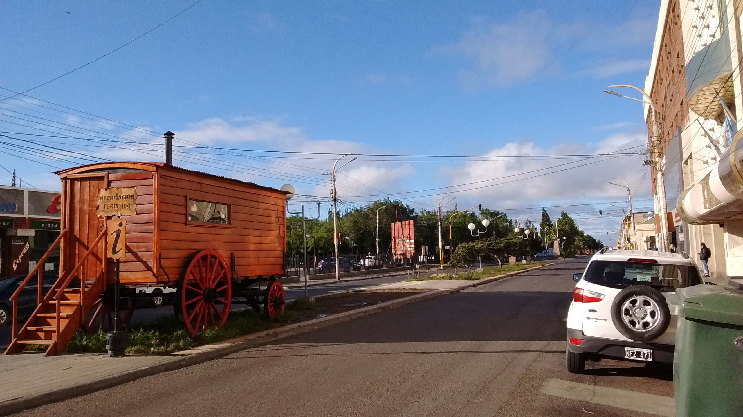 Av. San Martín, Río Gallegos.